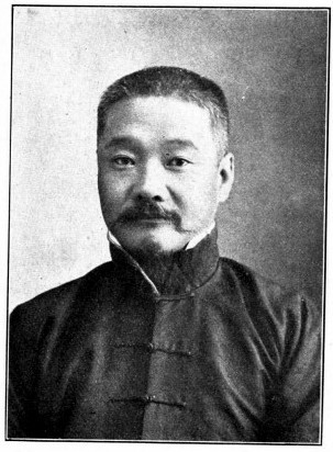 王鑫潤，民國政治人物、第一屆國會眾議院議員。